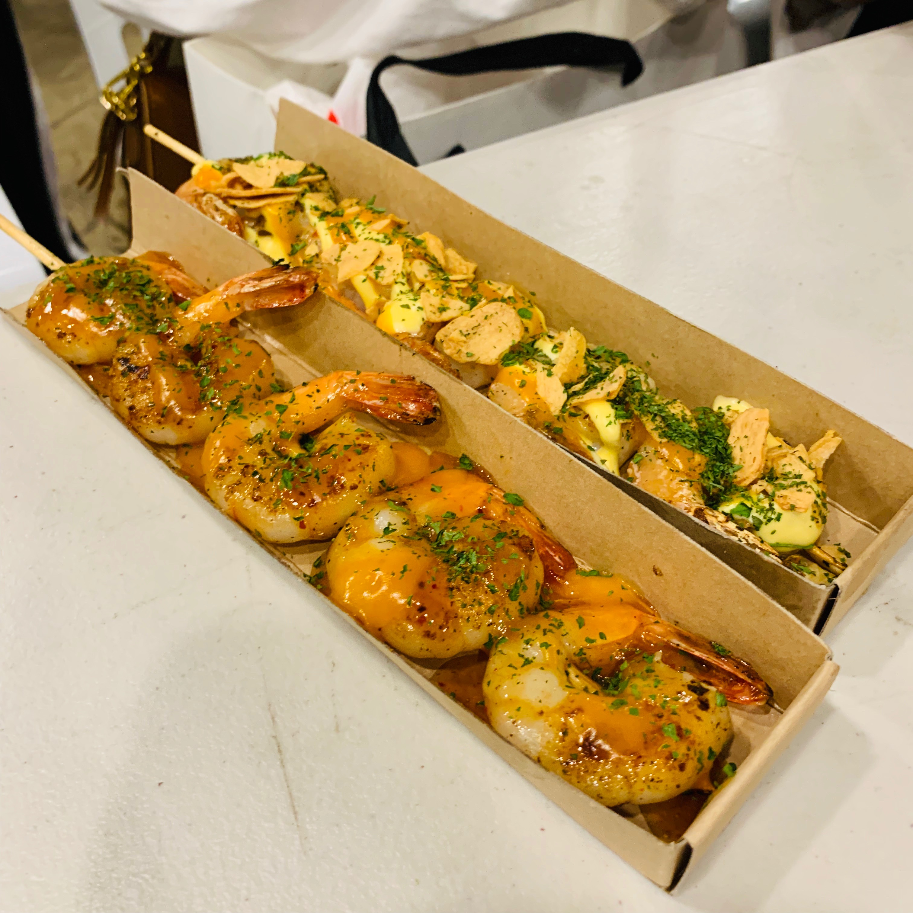 수많은 푸드트럭 음식 중 새우꼬치.